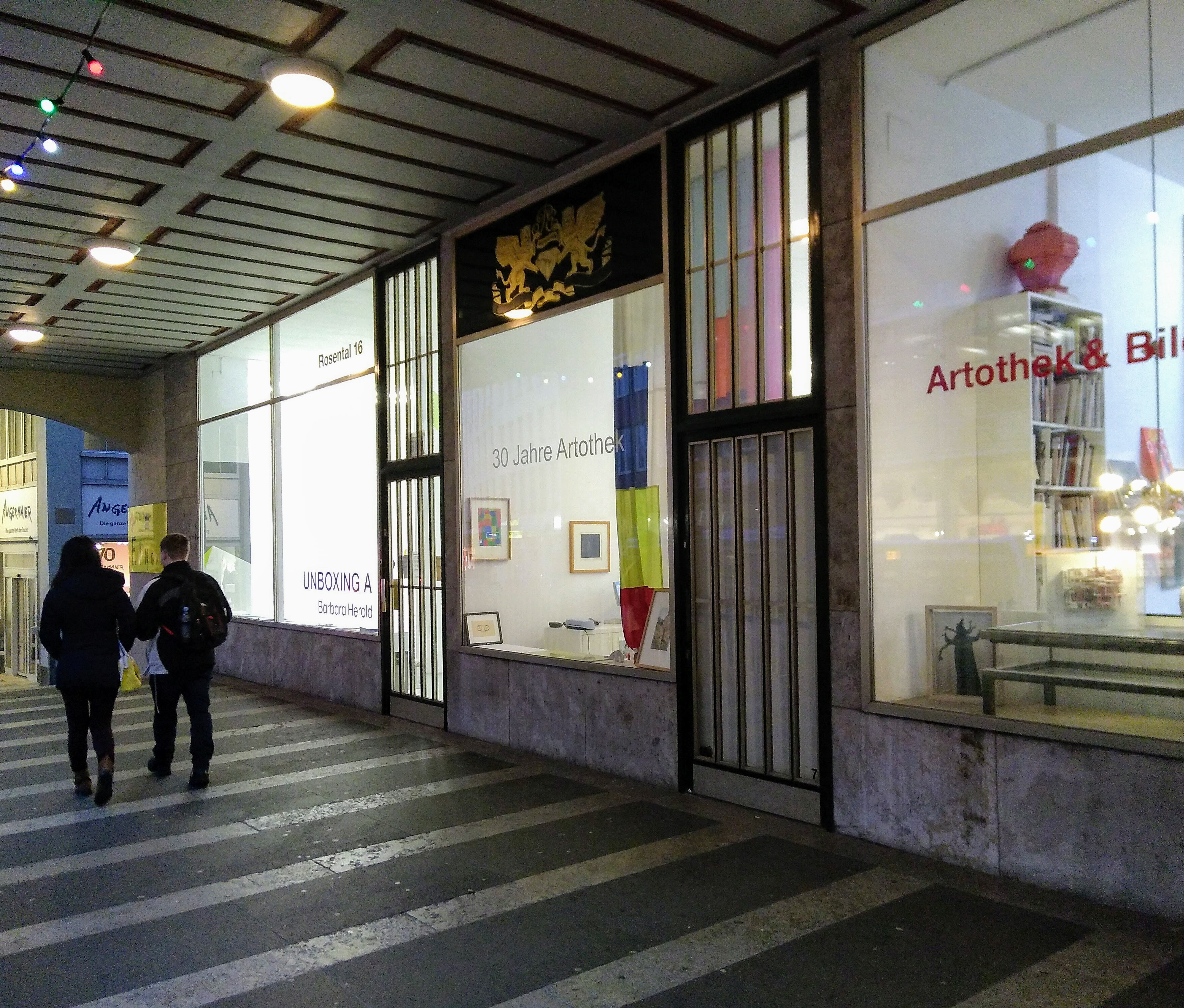 Der Eingangsbereich zur Münchner Artothek (2019) in der Passage Rindermarkt und Viktualienmarkt